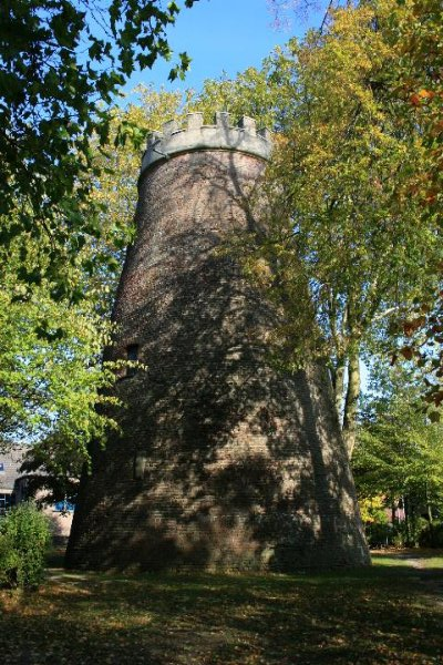 Denkmal Nr. 5 in Schwalmtal-Waldniel